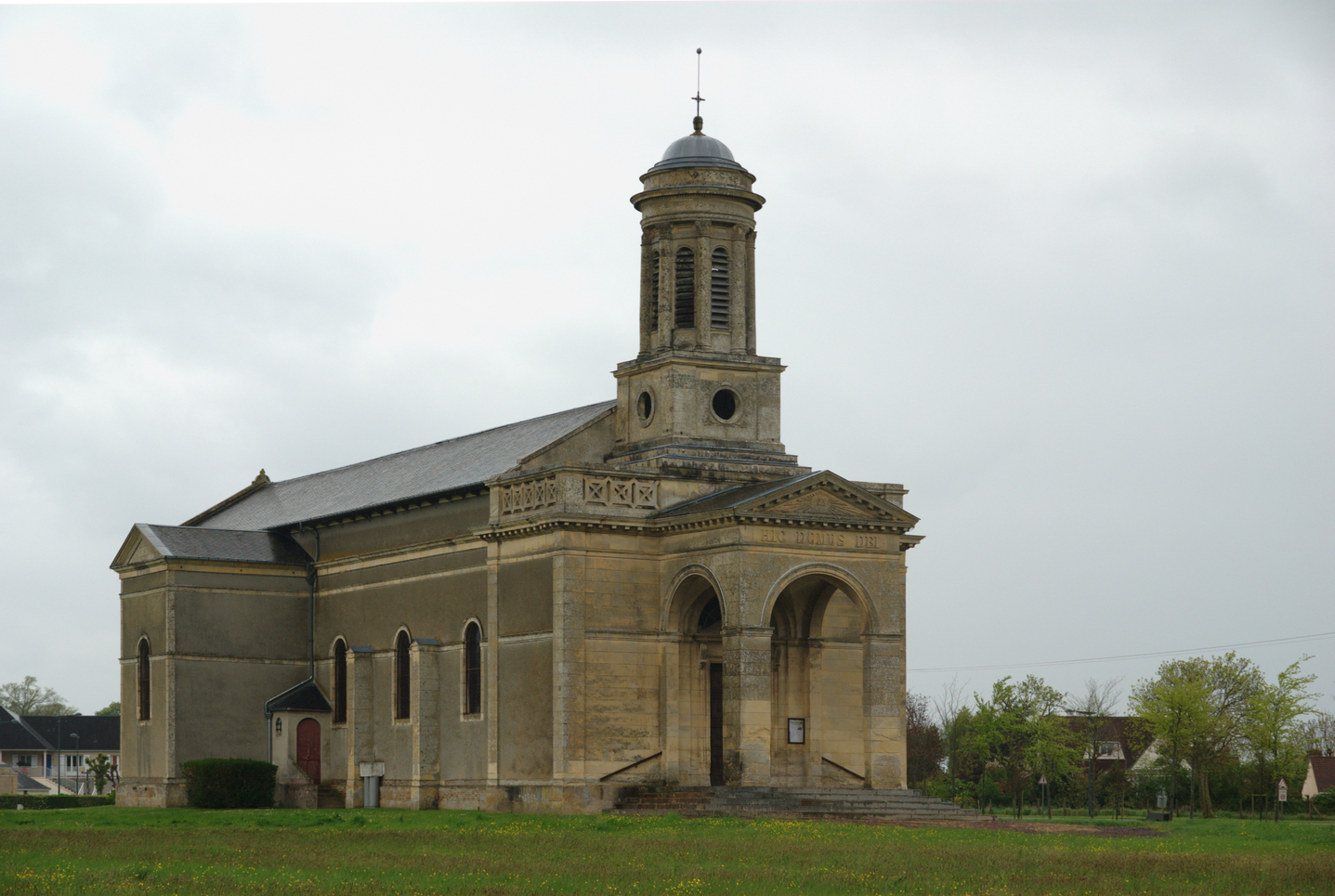 L'église St Martin, Amfreville 14.